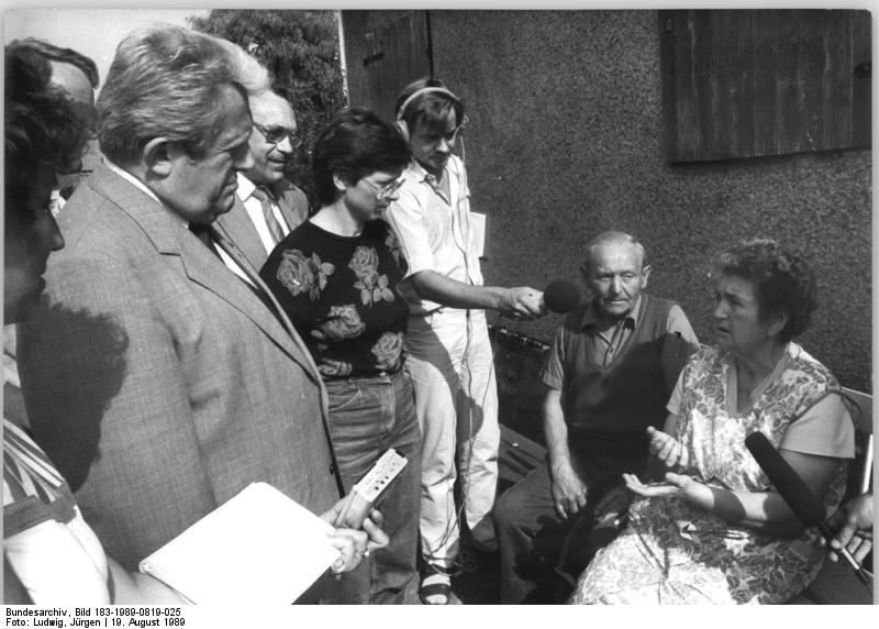 ADN-ZB Ludwig 19.8.89 Bez. Erfurt: Grenzprovokation In den Nachtstunden vom 17. zum 18. August beschossen zwei männliche Personen vom Gebiet der BRD aus Grenzsicherungsanlagen, Wohngebäude sowie die Kirche der unmittelbar an der Staatsgrenze der DDR liegenden Ortschaft Wahlhausen, Kreis Heiligenstadt. Gerhard Müller (l.), Kandidat des Politbüros des ZK der SED und 1. Sekretär der Bezirksleitung Erfurt, besuchte den Ort. Im Gespräch mit der Familie Feige bezeichnete er dies als eine der schlimmsten Provokationen an der Grenze zur BRD, die nach Kriegsende vorgekommen sei.